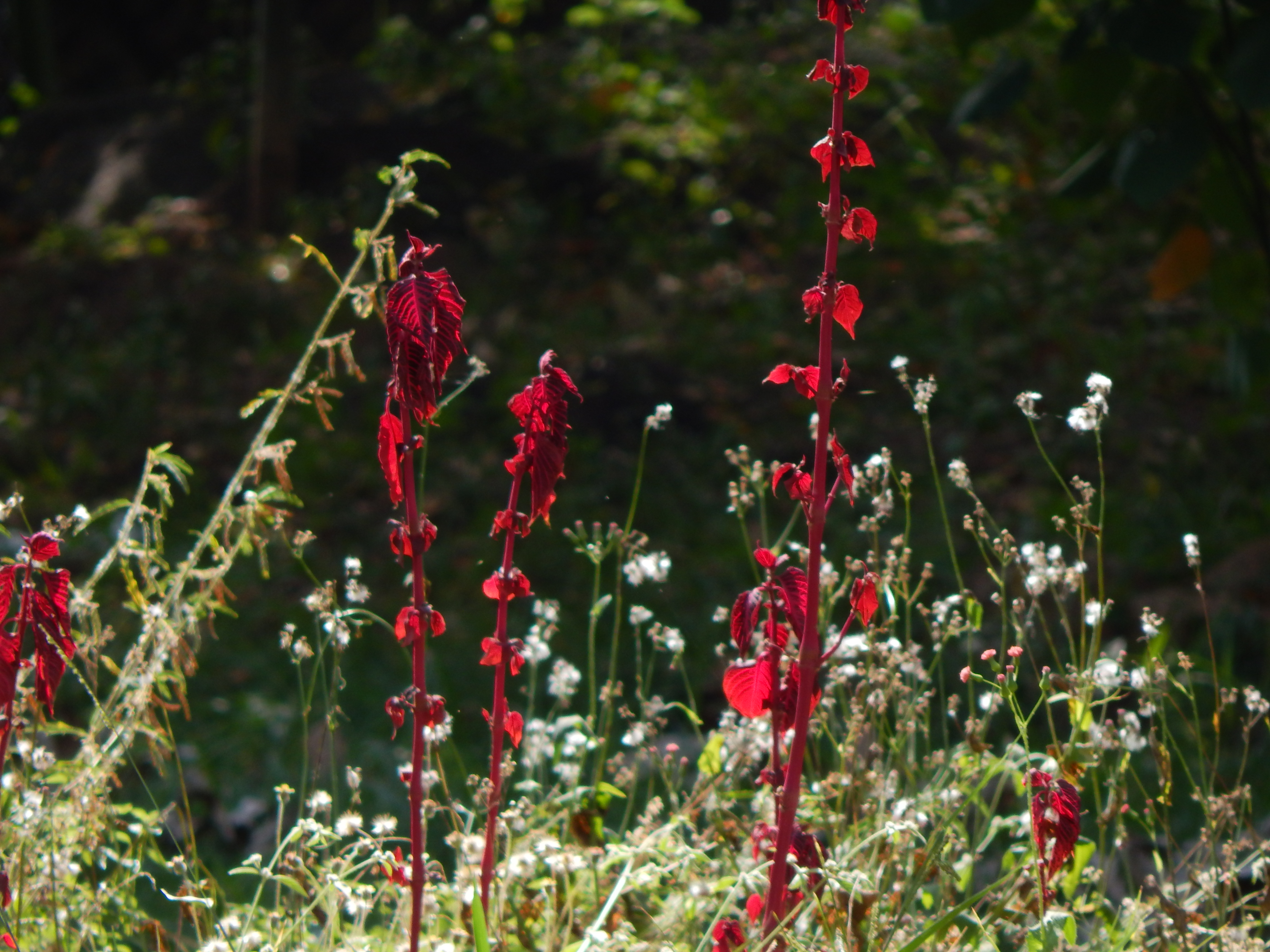 Flores fotografadas no Parque do Bicão